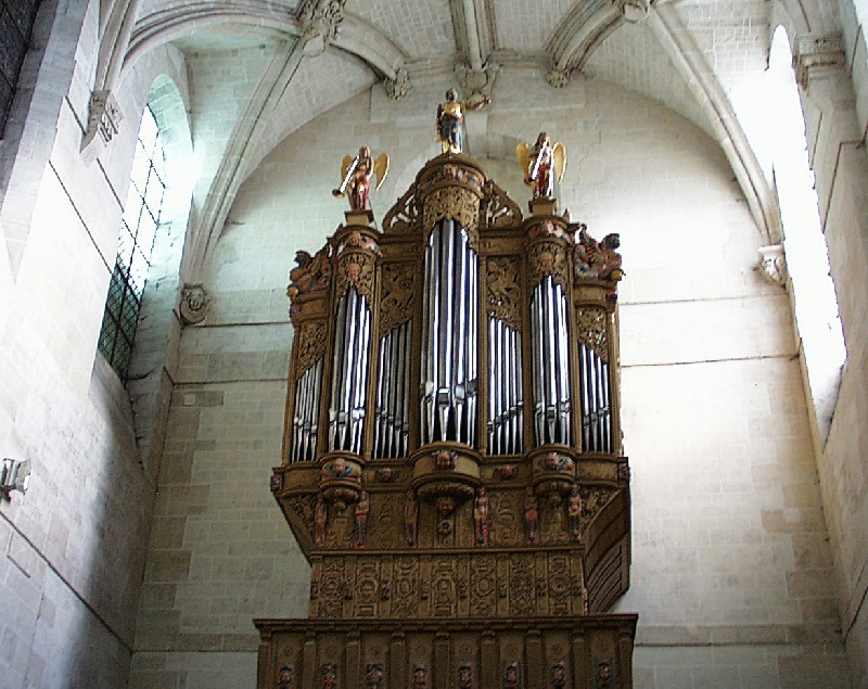 Dreux (Eure-et-Loire, France), église Saint Pierre, dans un buffet de 1614 de Toussaint Fortier, orgue d'Aristide Cavaillé-Coll de 1868, réutilisant du matériel ancien de l'orgue de Louis-Alexandre Clicquot de 1751, notamment 3 jeux d'anches; restauré en 1994 par Adrien Maciet.